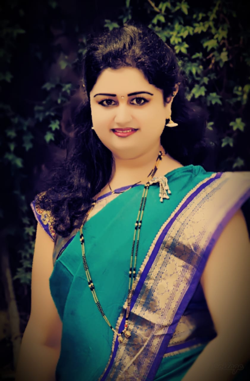 AswiniDeshpande